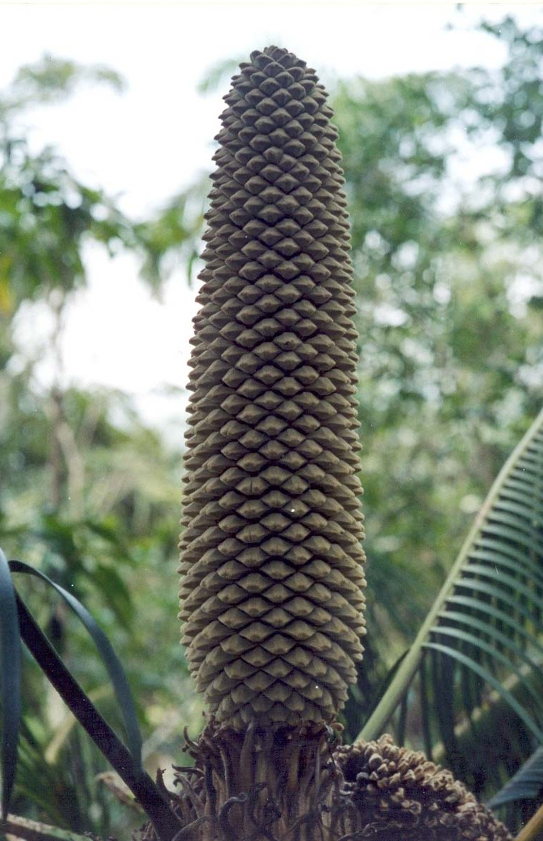 Cono masculino dehiscente de Microcycas calocoma, Parque Nacional Viñales, Pinar del Río, Cuba. Se observa caído a la derecha cono marchito del mes anterior. Escaneado de copia original.